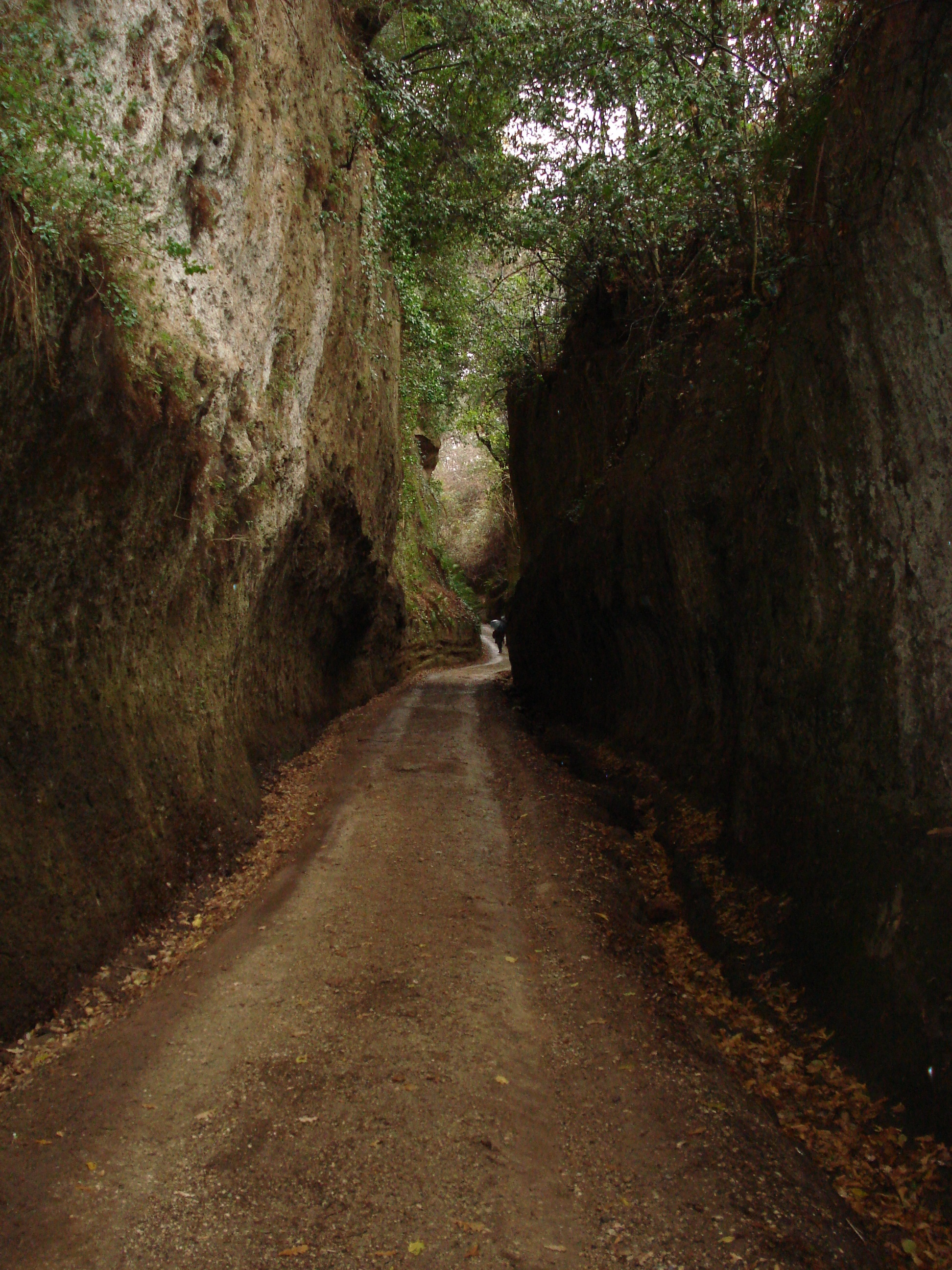 una delle affascinanti vie cave vicino Sovana e Pitigliano